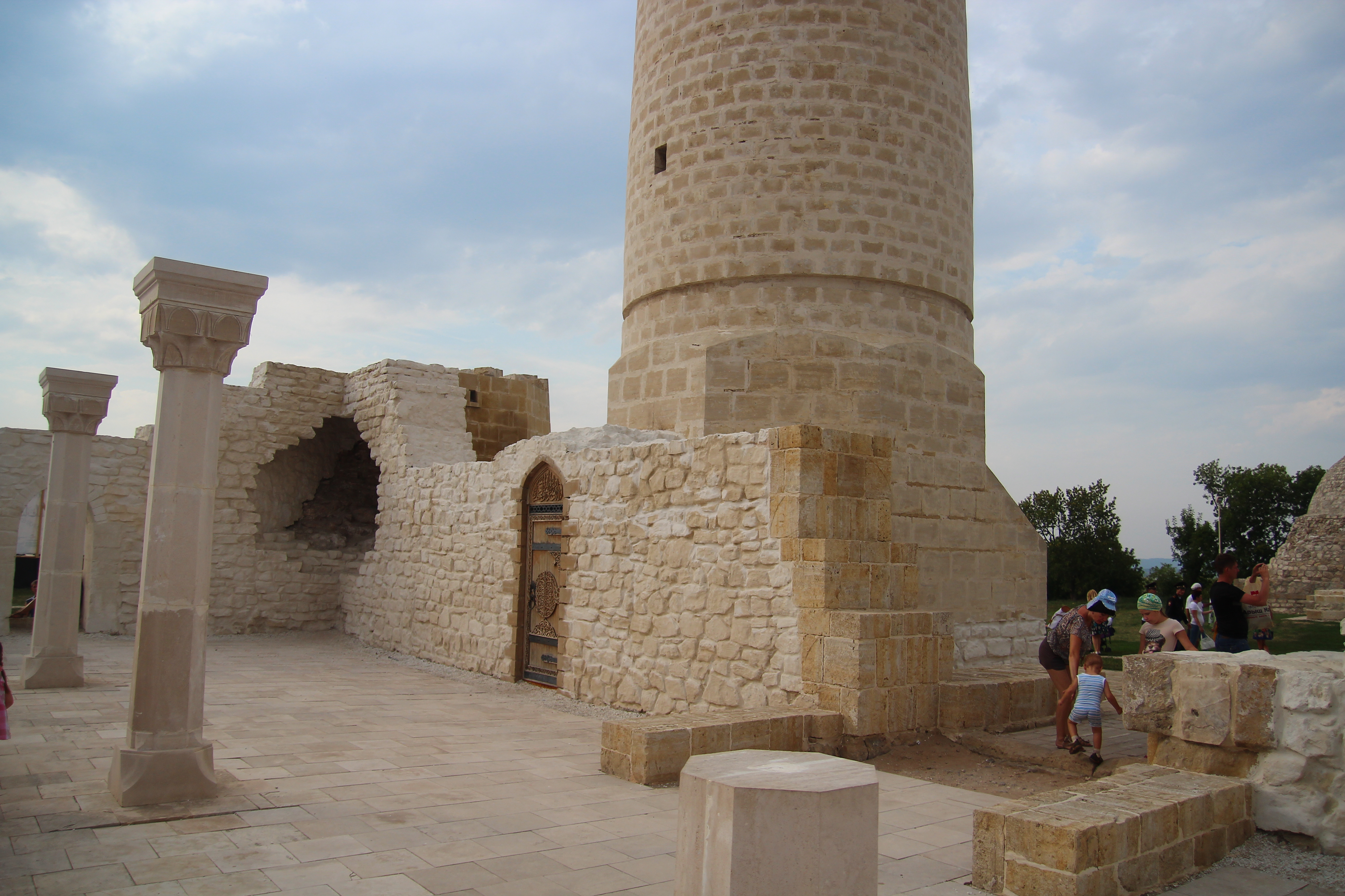 Комплекс памятников архитектуры XIII-XIV вв. на территории Булгарского городища (архитектурный комплекс «Болгары») (Республика Татарстан, Болгар, село Болгары, городище)